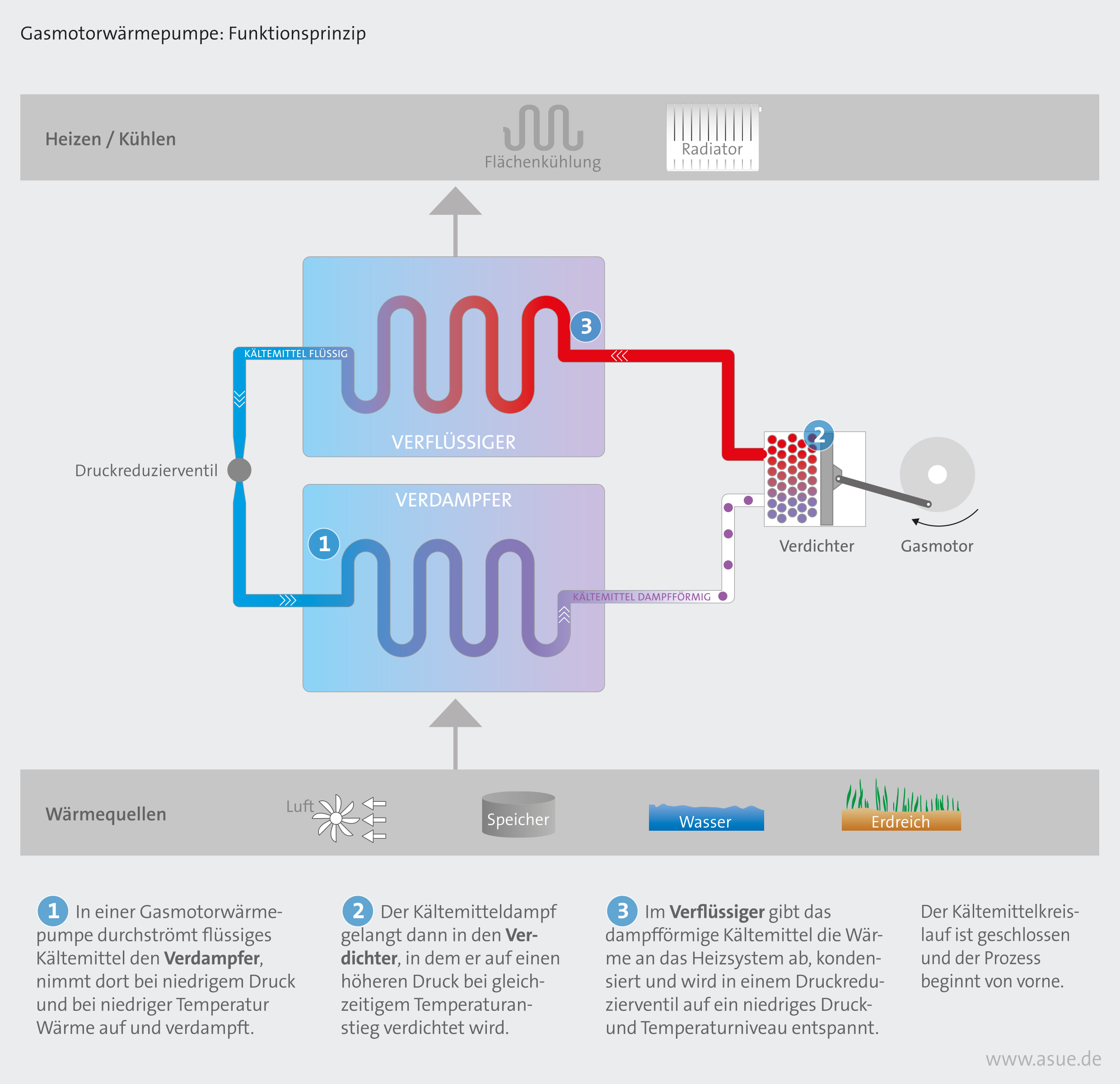 Prinzip einer Gasmotorwärmepumpe